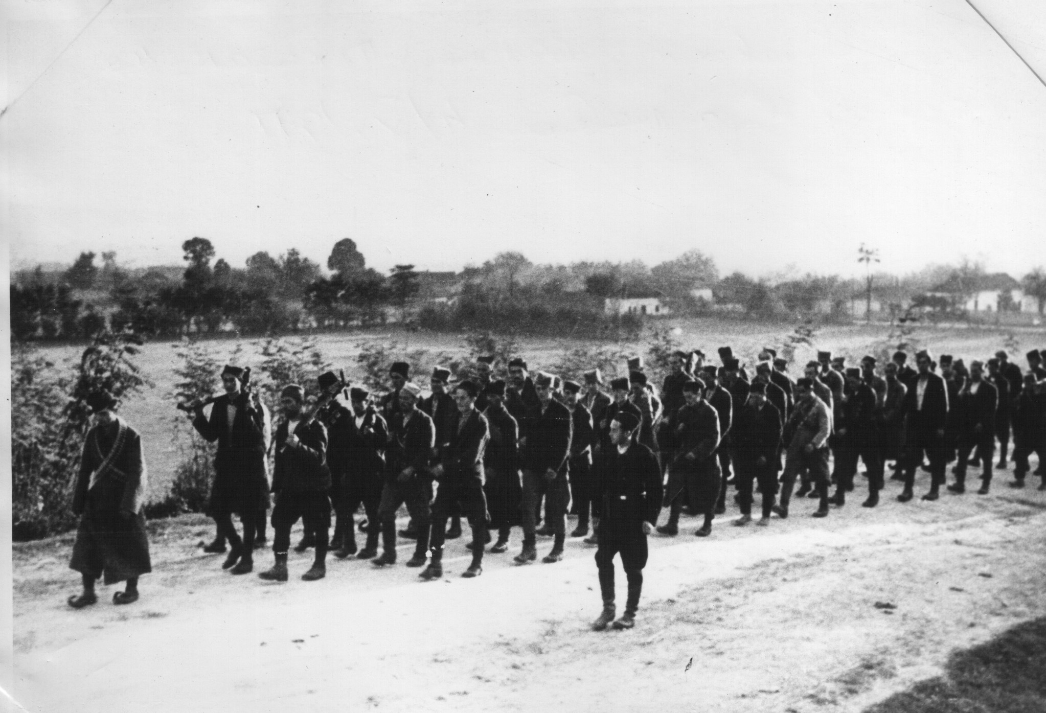 Srpskohrvatski / српскохрватски: Borci Trnavskg bataljona polaze na opsadu Kraljeva 1941. godine.